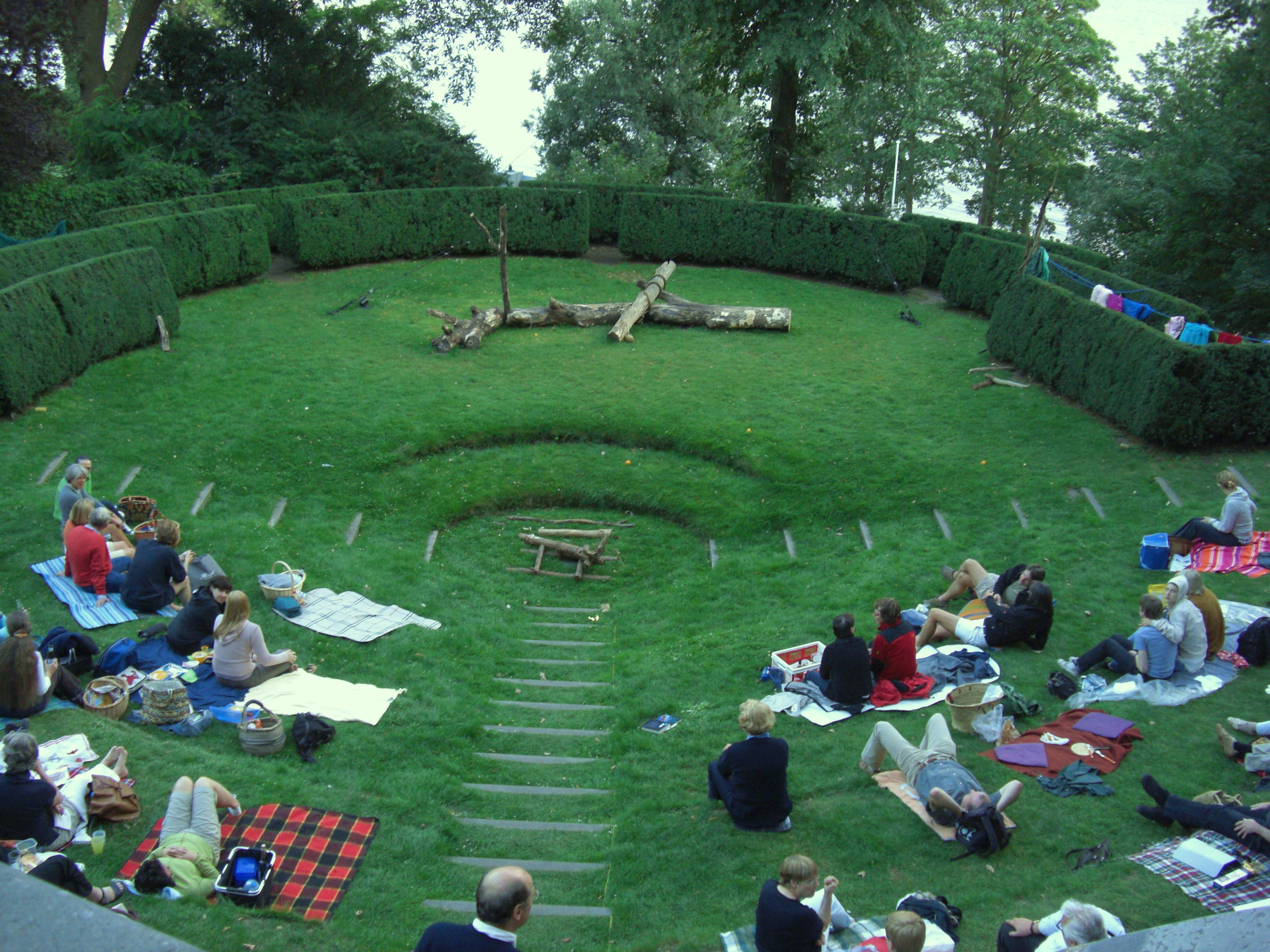 Römischer Garten in Hamburg, bei einer Aufführung des Stückes Sturm von W. Shakespeare This is a photograph of an architectural monument.